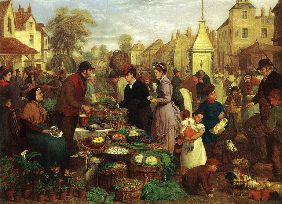 Market Day